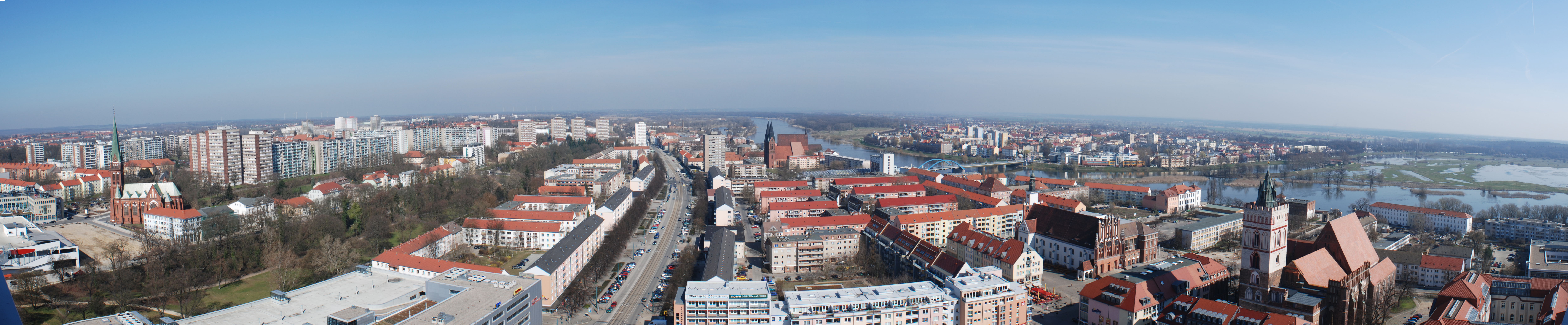 Panorama der Innenstadt von Frankfurt (Oder).